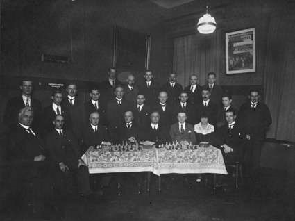 Eigendom Heerlensche Schaakvereeniging